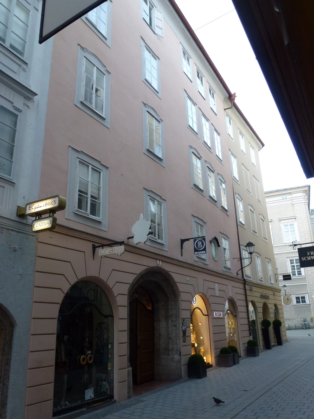 Bürgerhaus, Gusettihaus